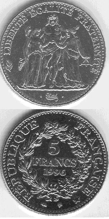 Date : 9 septembre 2004 Source : scan personnel d'archeos Description : Avers et revers de la pièce de 5 francs français de Type Dupré émise en 1996. Permission : L'auteur de cette gravure, Augustin Dupré, est mort en 1833 Catégorie:Image de franc français